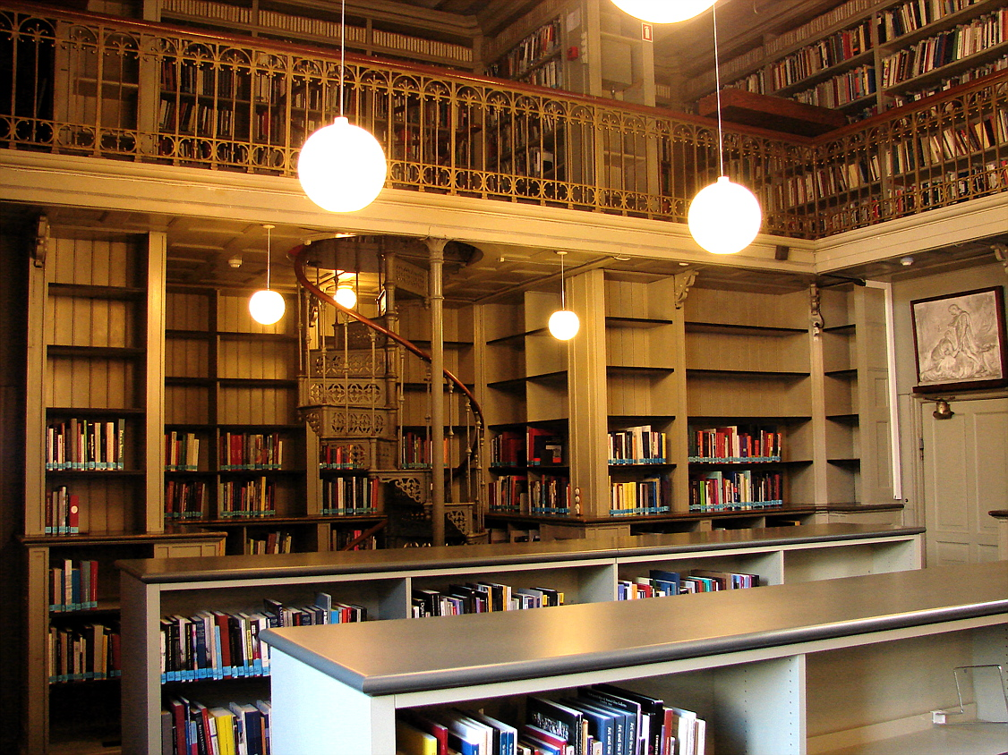 Danmarks Kunstbibliotek i København